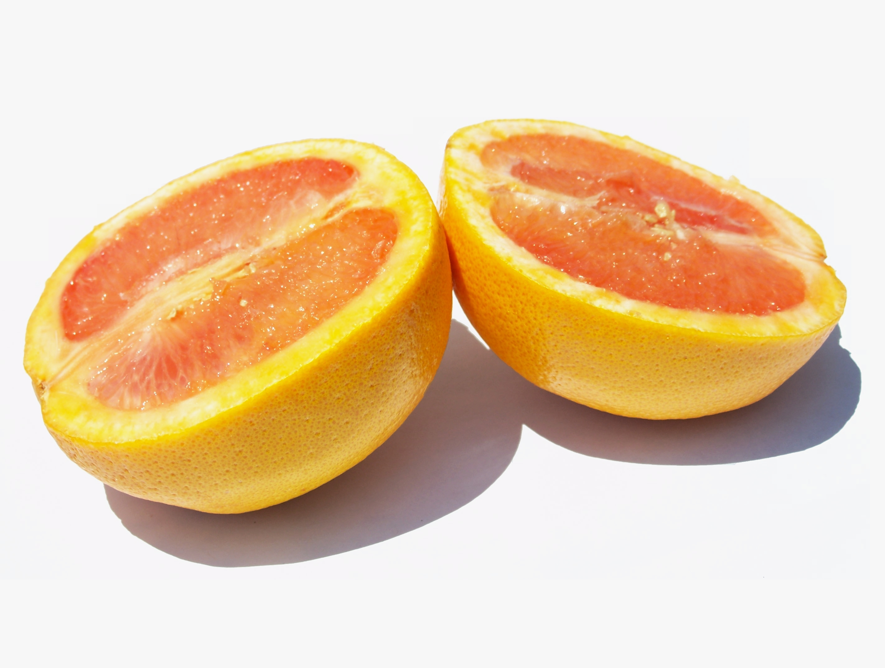 A sliced grapefruit (Citrus paradisi)